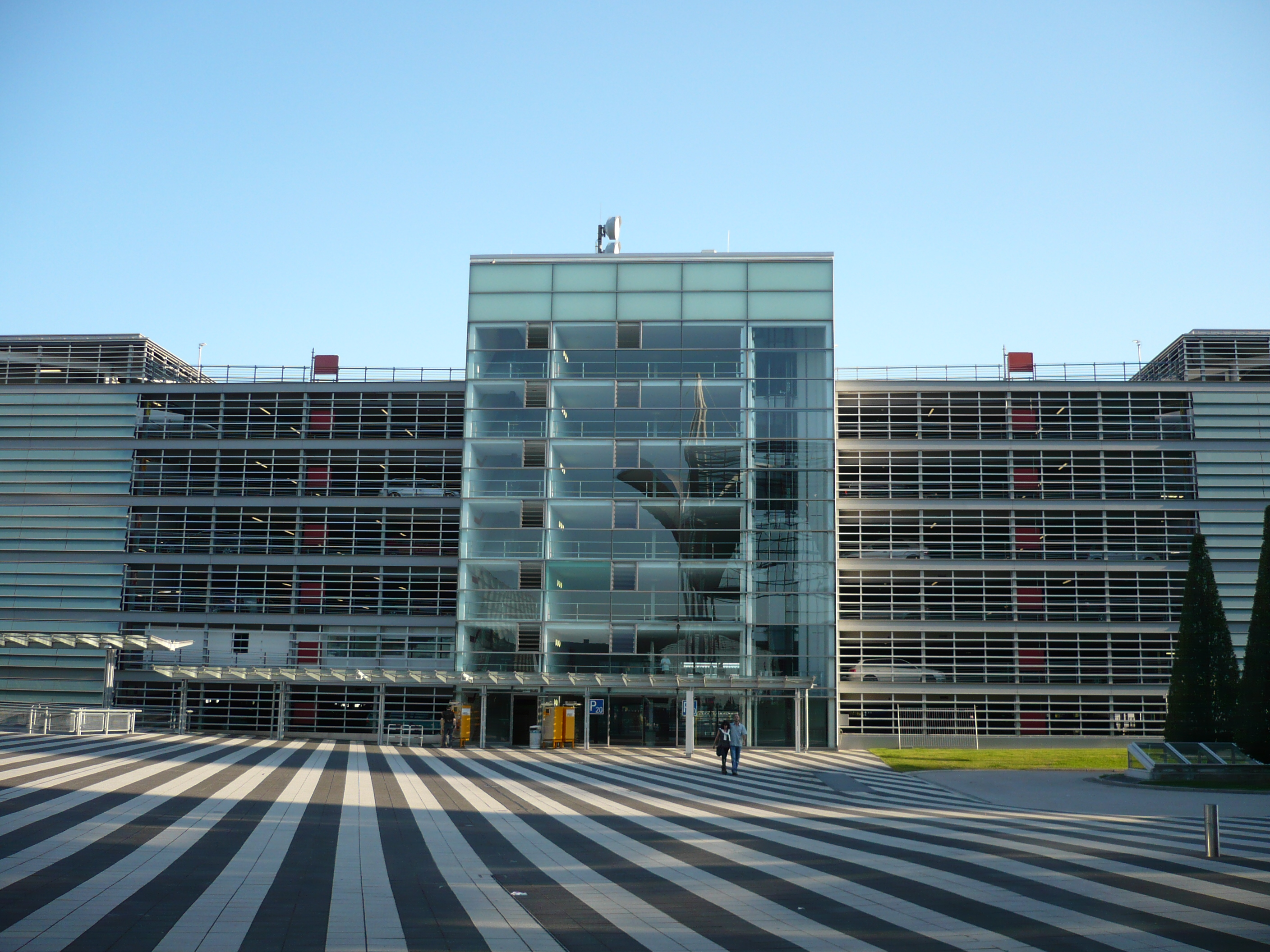 Parkhaus P20 des Flughafen Münchens